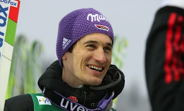 Martin Schmitt podczas konkursu drużynowego mężczyzn na skoczni normalnej podczas Mistrzostw Świata w Narciarstwie Klasycznym 2011 w Oslo.